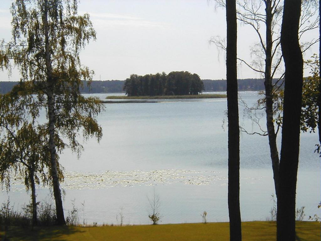 Lielais Baltezers ar Priežu salu 2002-07-13